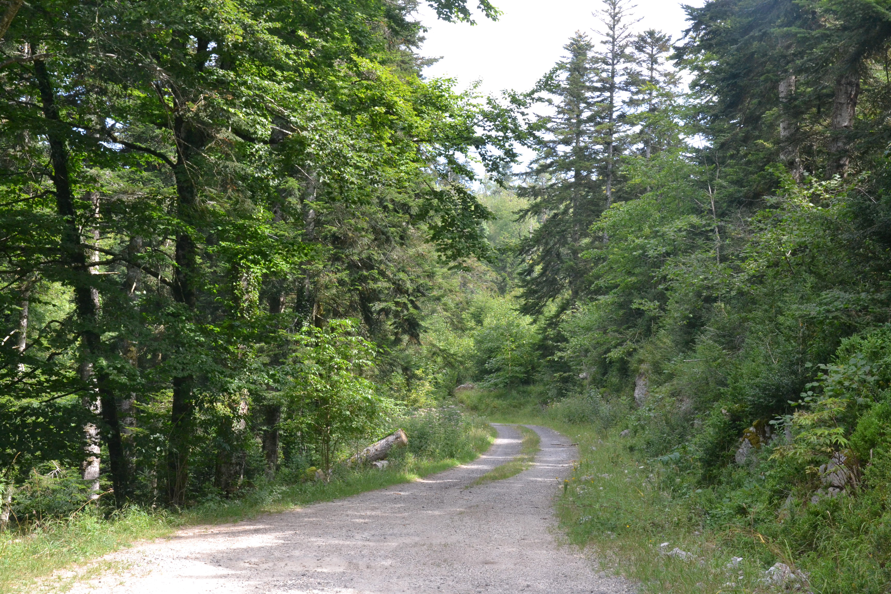 Forêt domaniale des Fanges, commune de Puilaurens (Aude, France).